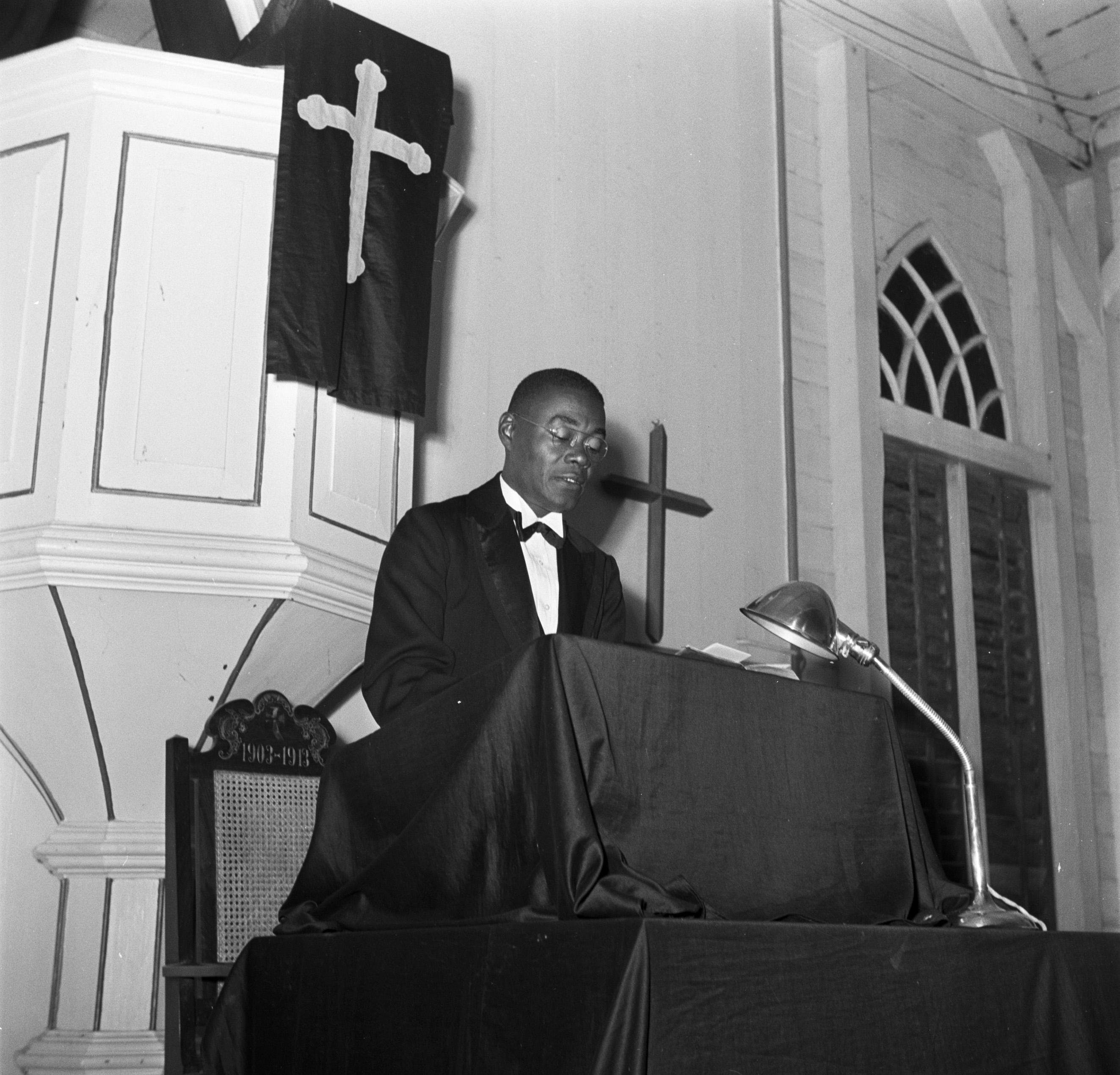 Collectie / Archief : Fotocollectie Van de Poll Reportage / Serie : Reis naar Suriname en de Nederlandse Antillen Beschrijving : Een dominee achter een lessenaar voor de kansel in de protestantse kerk in Nieuw-Nickerie. Van de lessenaar van de kansel hangt een antepenium met kruis Datum : 1947 Locatie : Nieuw-Nickerie, Suriname Trefwoorden : antependiums, interieur, kerkgebouwen, liturgie, predikanten, preekstoelen, religieuze voorwerpen Fotograaf : Poll, Willem van de Auteursrechthebbende : Nationaal Archief Materiaalsoort : Negatief (zwart/wit) Nummer archiefinventaris : bekijk toegang 2.24.14.02 Bestanddeelnummer : 252-5490